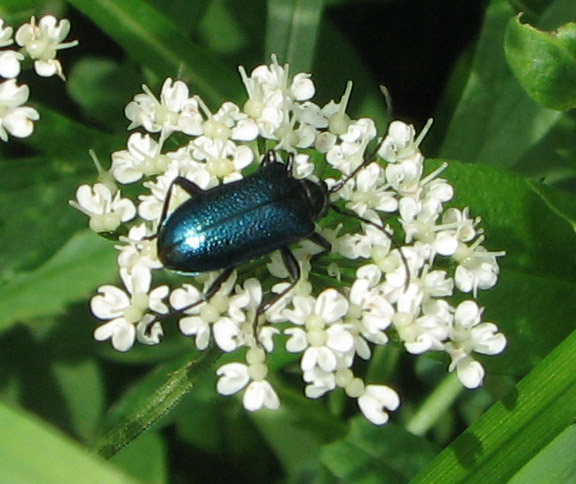 Gaurotes virginea